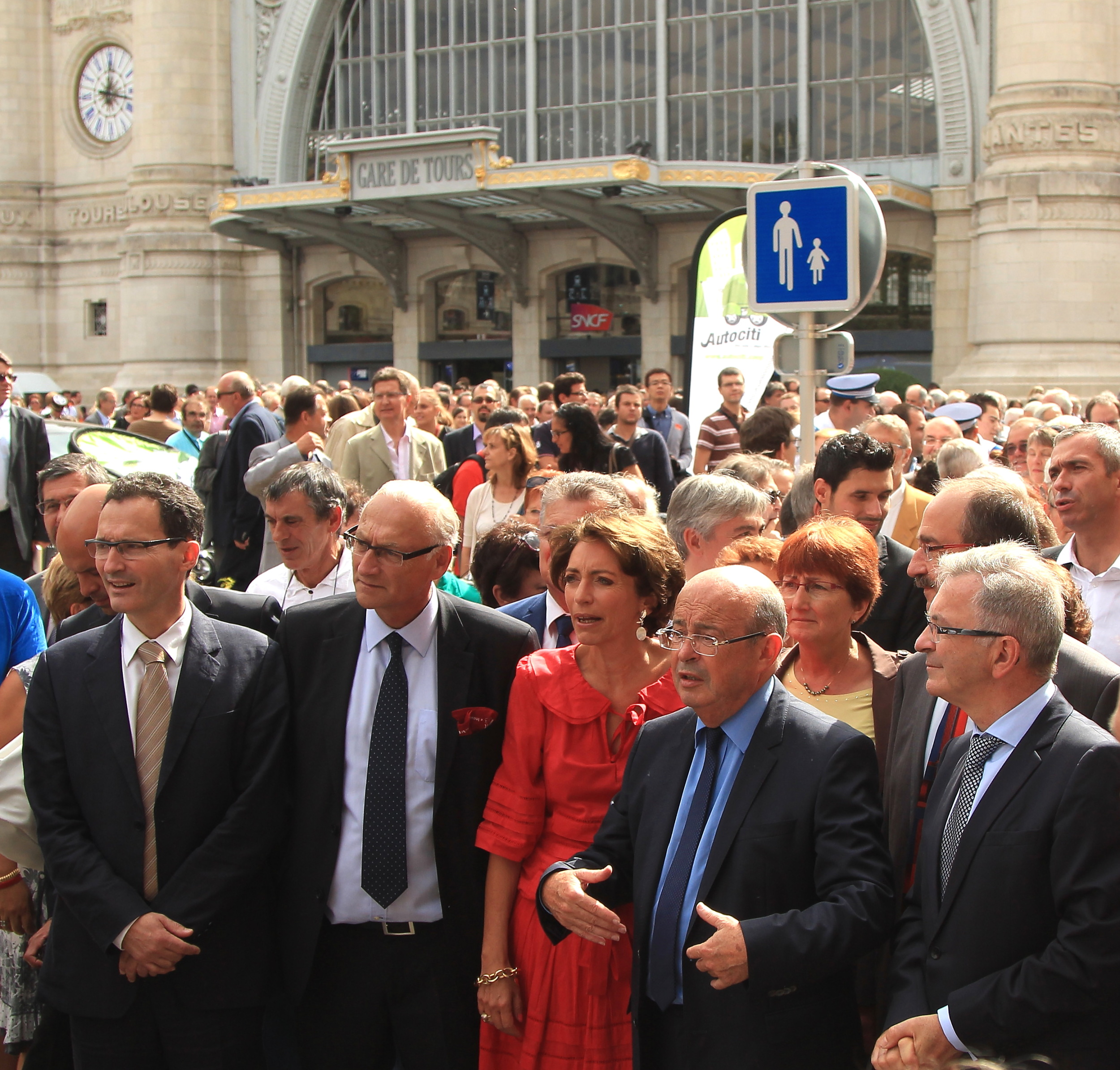 De gauche à droite : Frédéric Thomas, Philippe Le Breton, Marisol Touraine, Jean Germain et François Bonneau, lors de l'inauguration du tramway de Tours, ouvrant la marche entre la gare et la mairie.